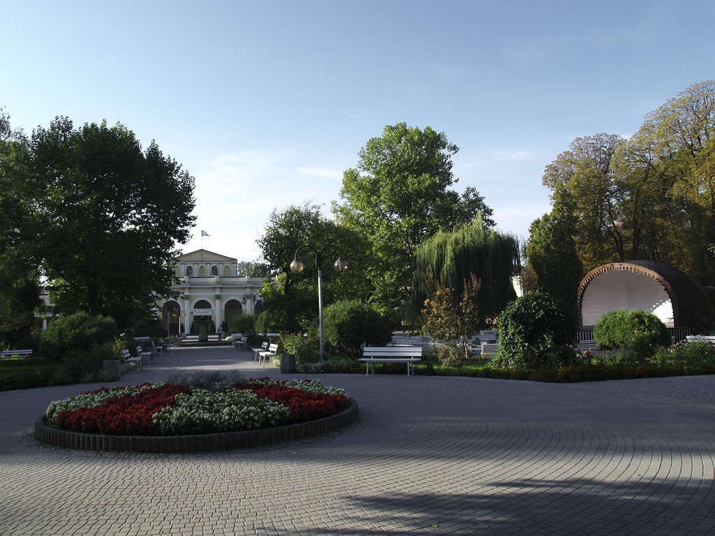 Park zdrojowy Busko-Zdrój License on Flickr (2011-01-18): CC-BY-SA-2.0 Flickr tags: Busko, Zdrój, Marconi